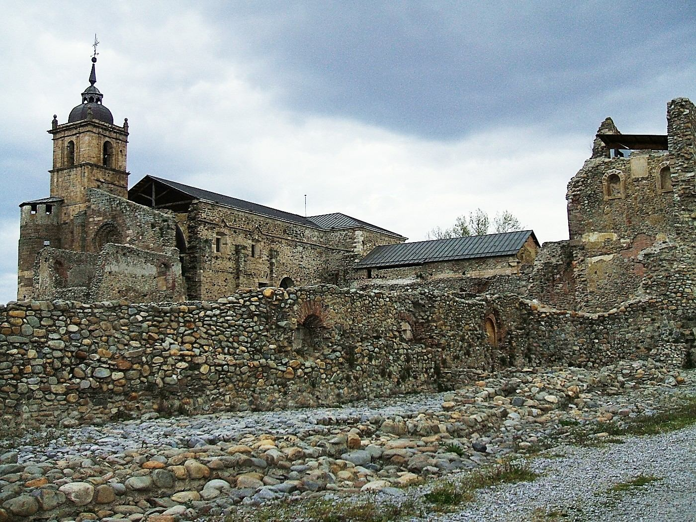 Monasterio de Santa María de Carracedo, en Carracedo del Monasterio, León, España